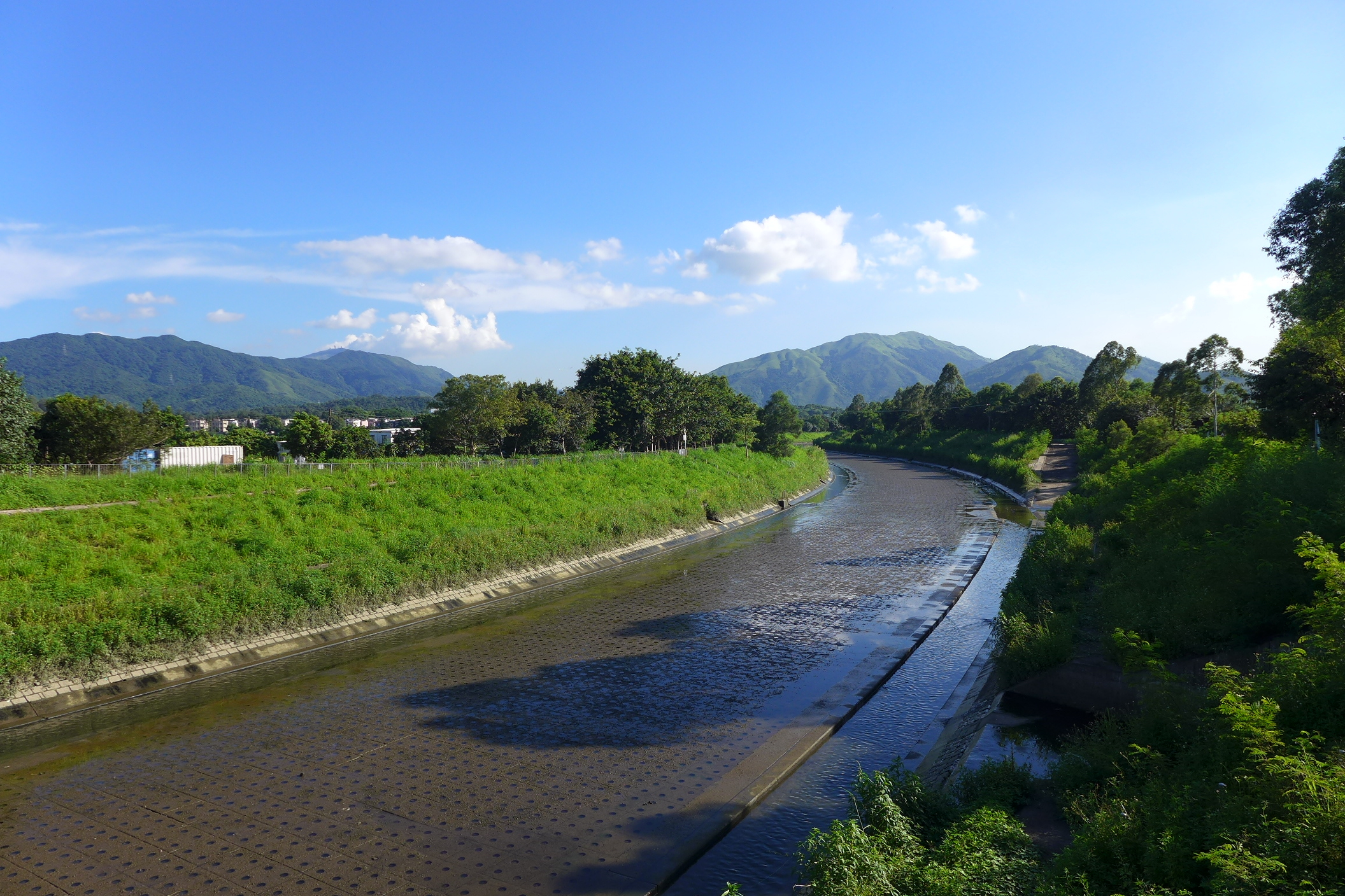 Sheung Yue River